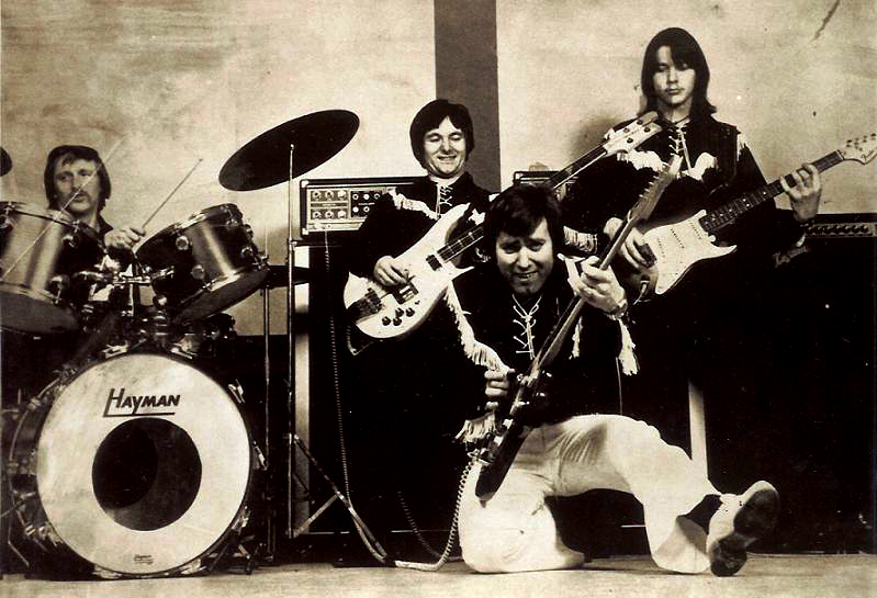 Le guitariste Burt Blanca et son orchestre.